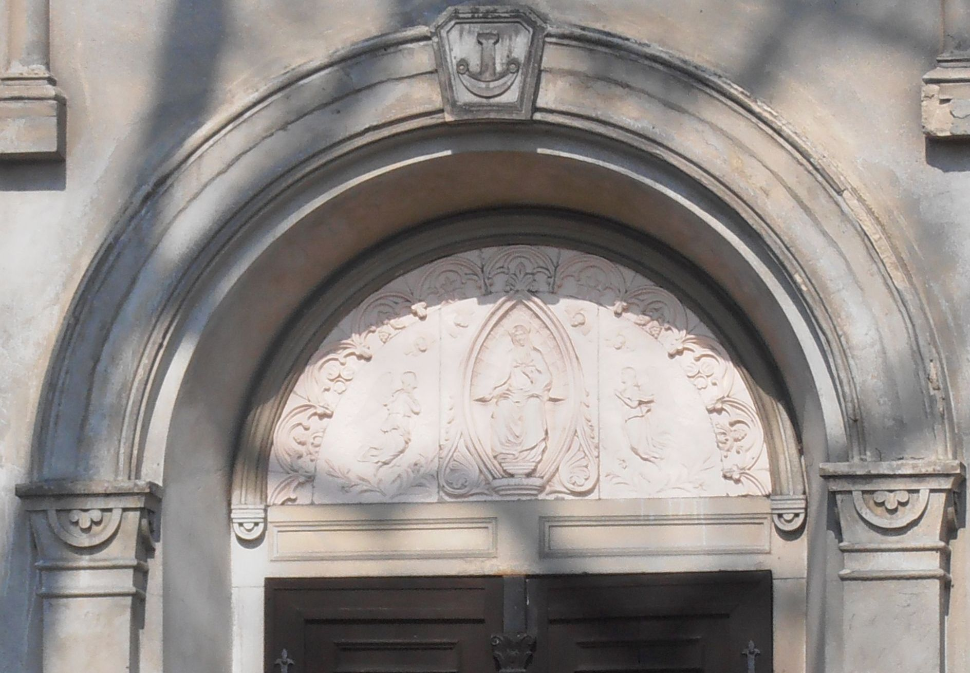 Maluszyn - portal kaplicy św. Barbary z herbem rodziny Ostrowskich (zabytek 400/86)